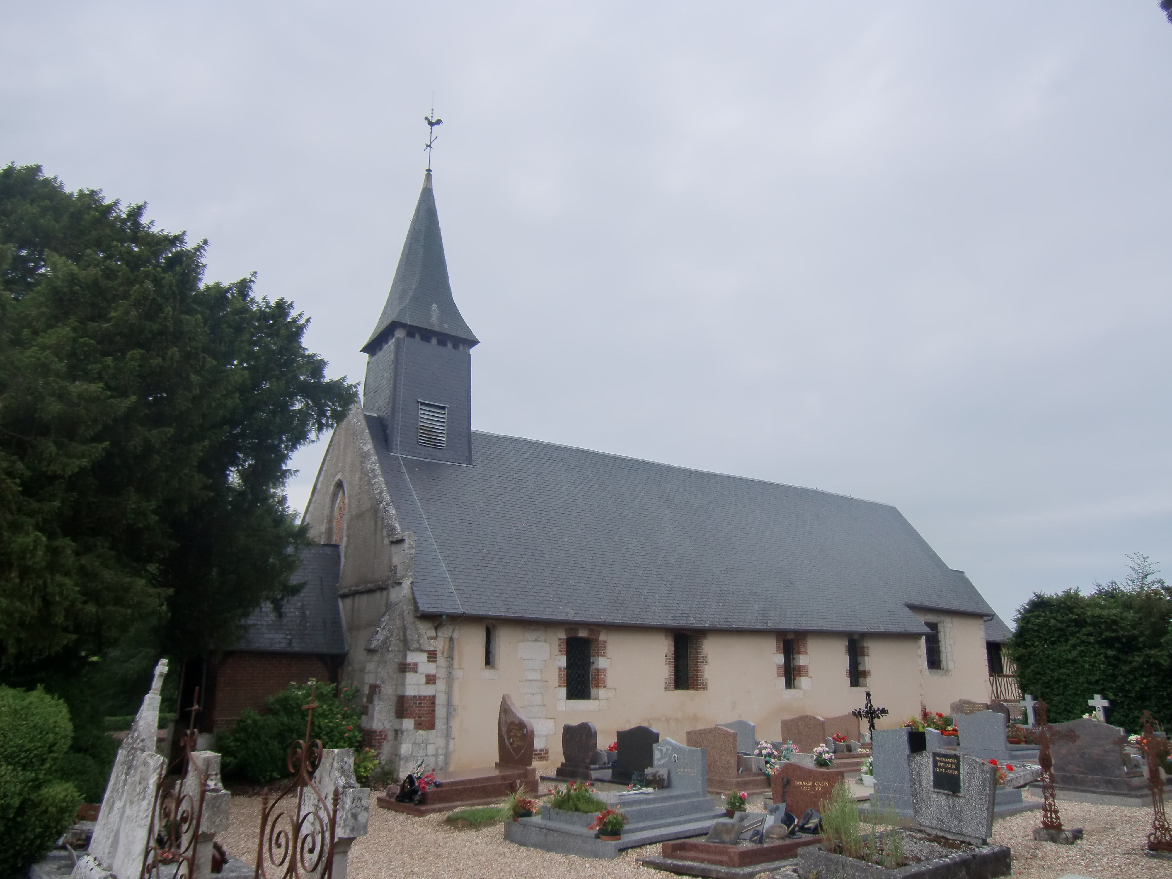 Église de Theillement (Eure, Normandie, France)